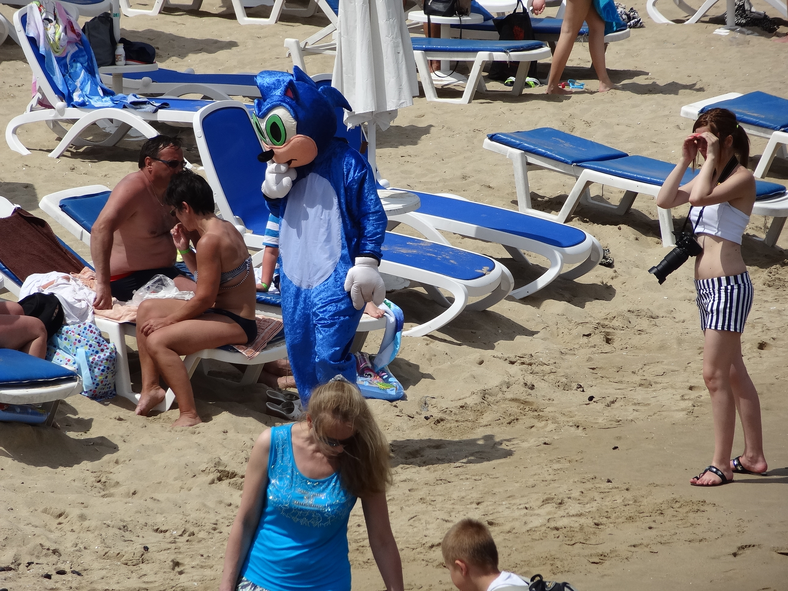 Costumed man seeking for customers, wants to be fotographed for some Lewa